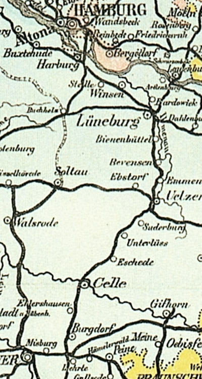 Ausschnitt Hamburg-Hannover aus der Bahnkarte_Deutschland_1899